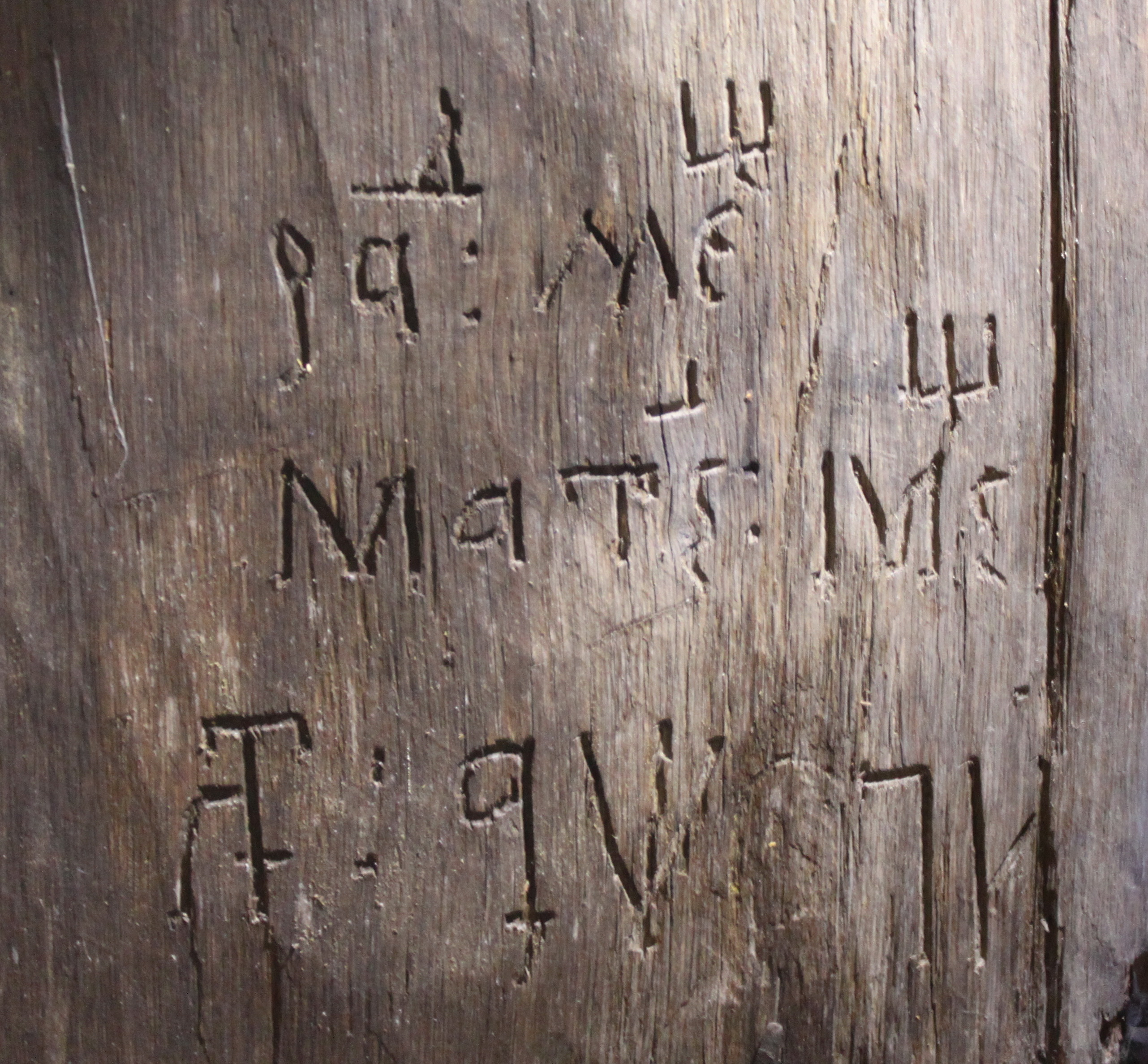 Biserica de lemn din Podu Broşteni, judeţul Argeş.